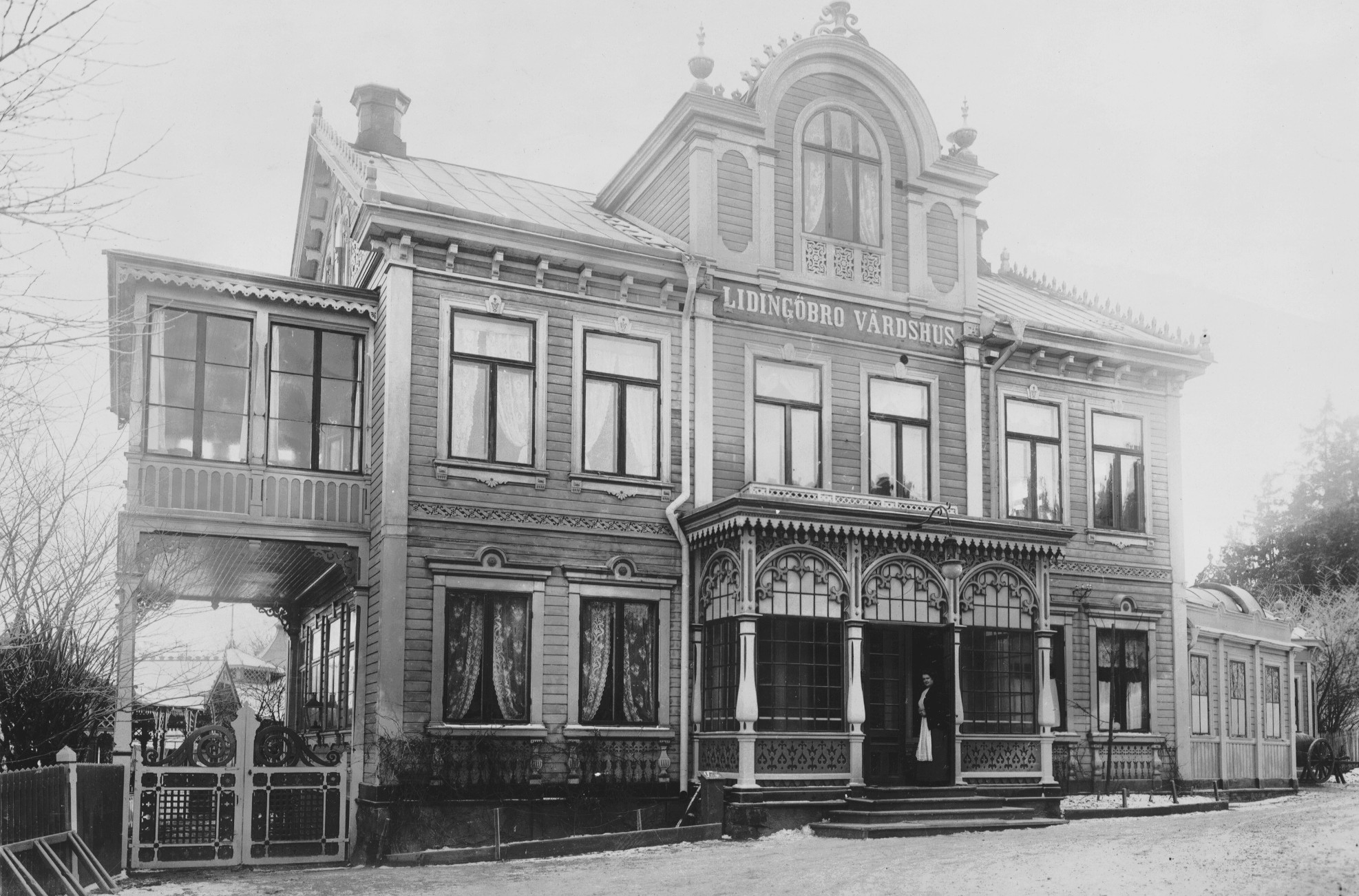 Lidingöbro värdshus, huvudbyggnad från entrésidan